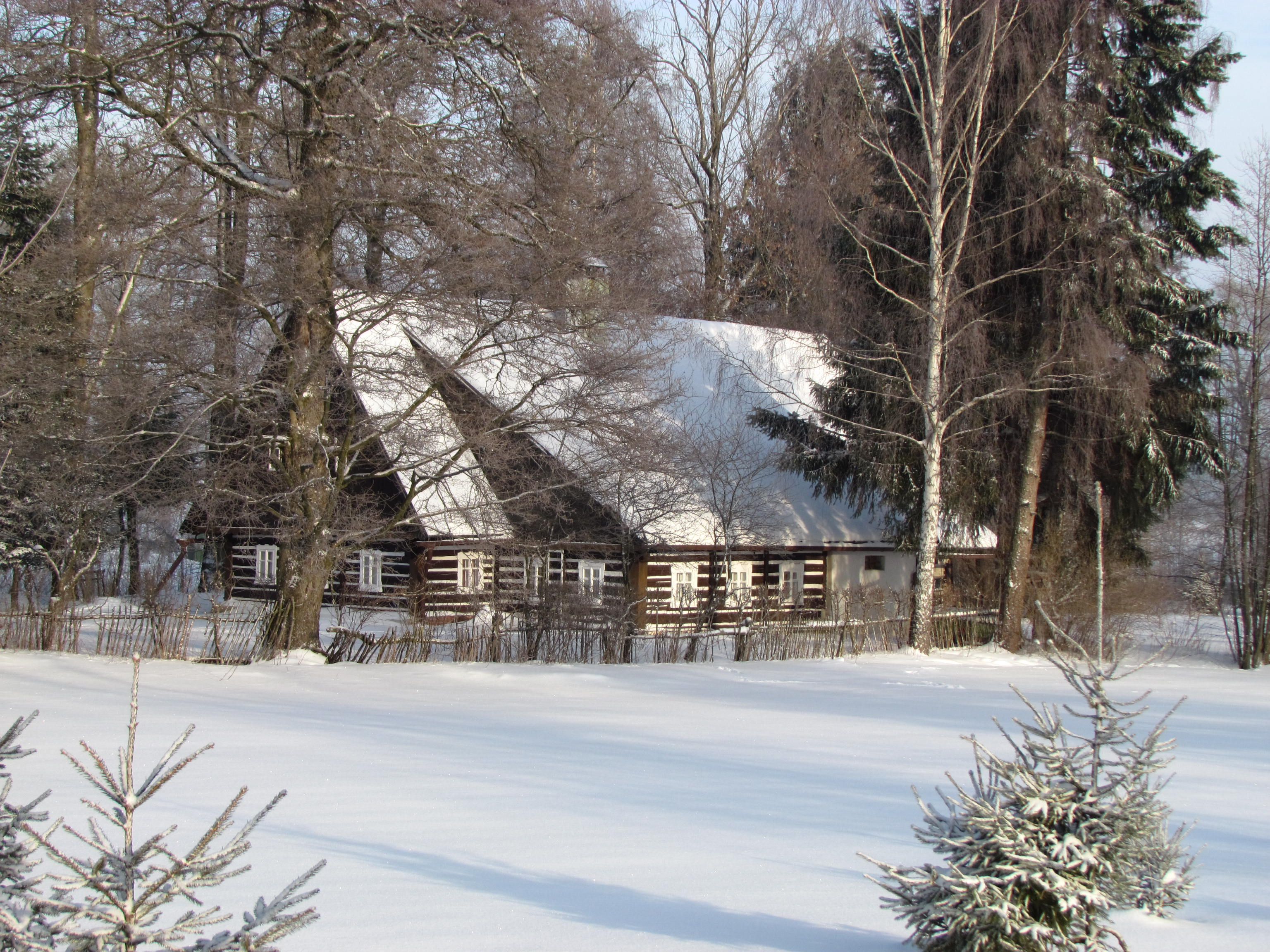 Žacléř - Bobr-chaloupka